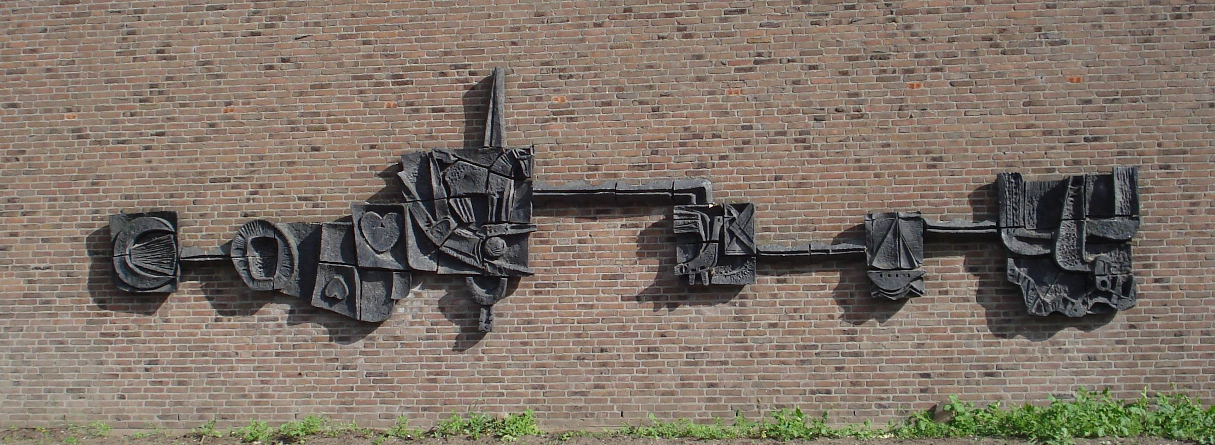 Capelle aan den IJssel, Merellaan. Reliëf "De bruggen van Paulus" van Frans Cox. Capelle a/d IJssel/The Netherlands.